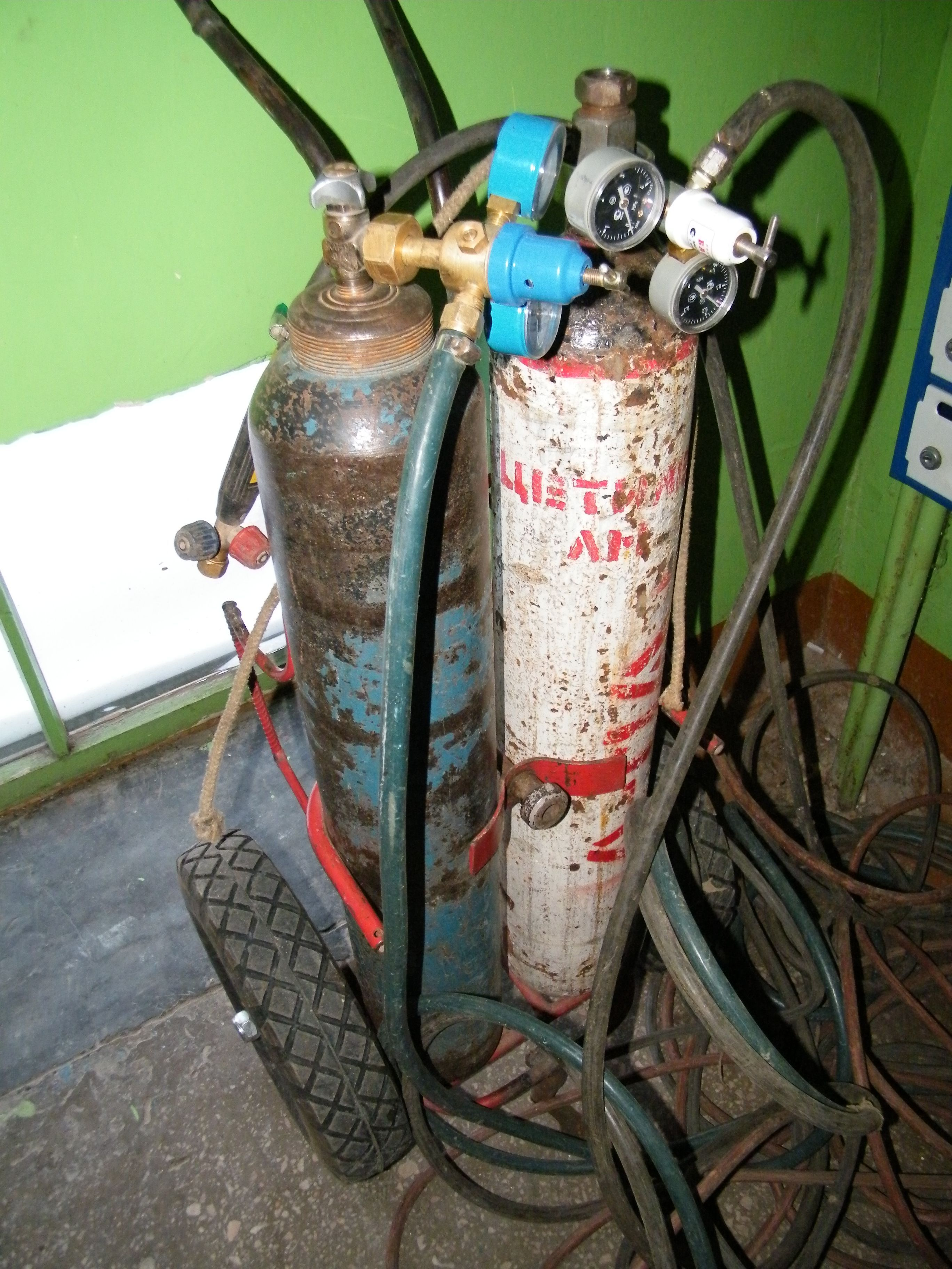 Ацетиленовый и кислородный баллон с редукторами